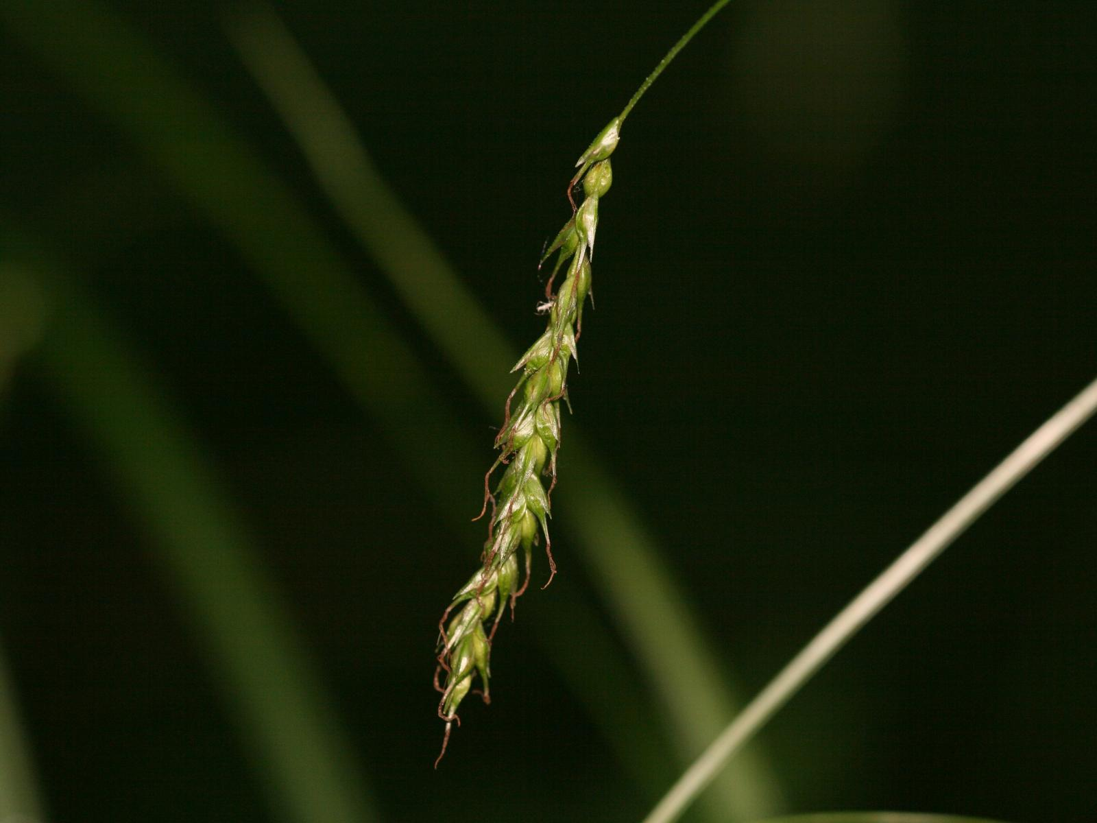 Dünnährige Segge (Carex strigosa)